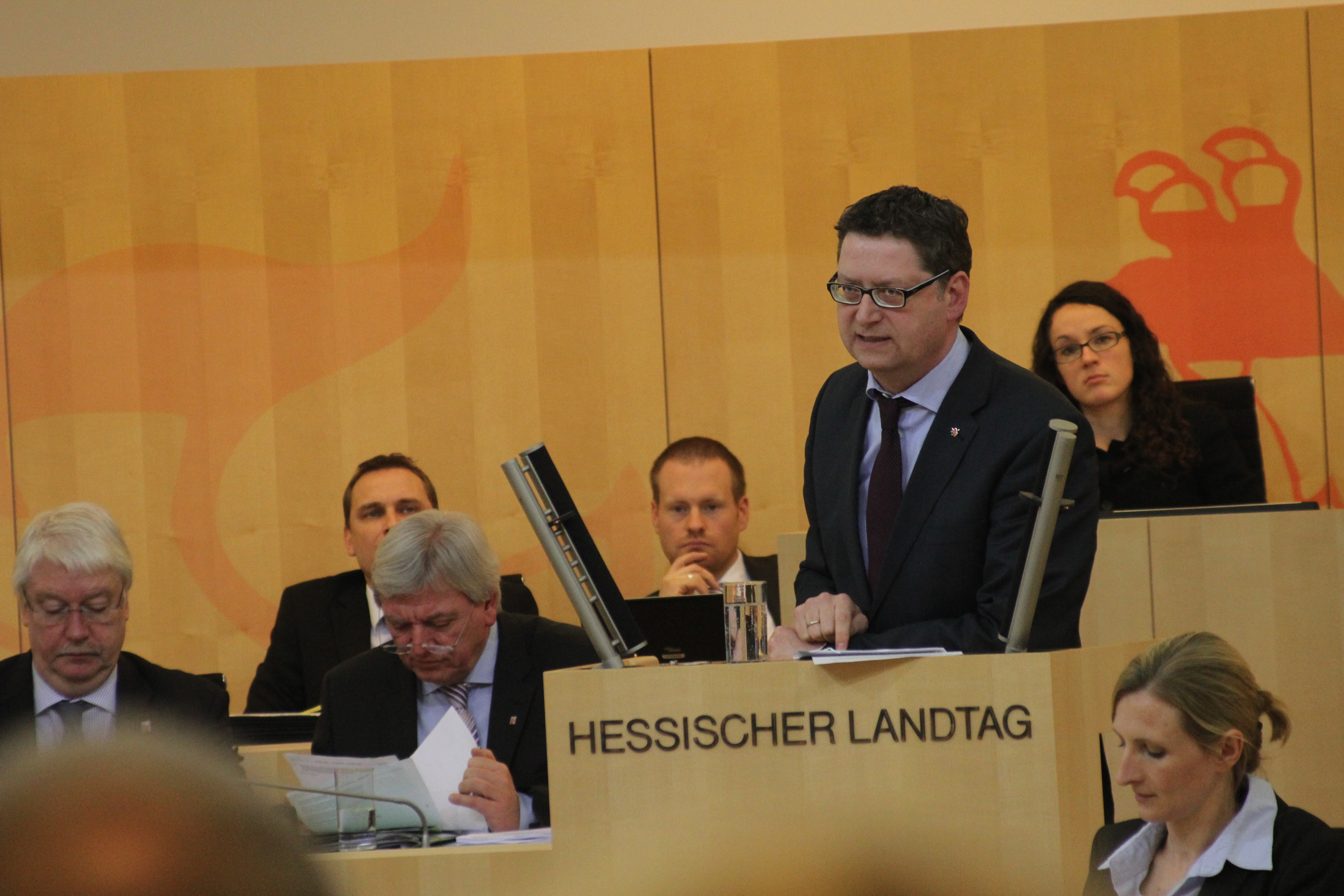 Thorsten Schäfer-Gümbel, hessischer Politiker (SPD) und Abgeordneter des Hessischen Landtags